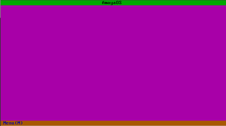 AmayaOS 0.06 - Window Manger & Desktop